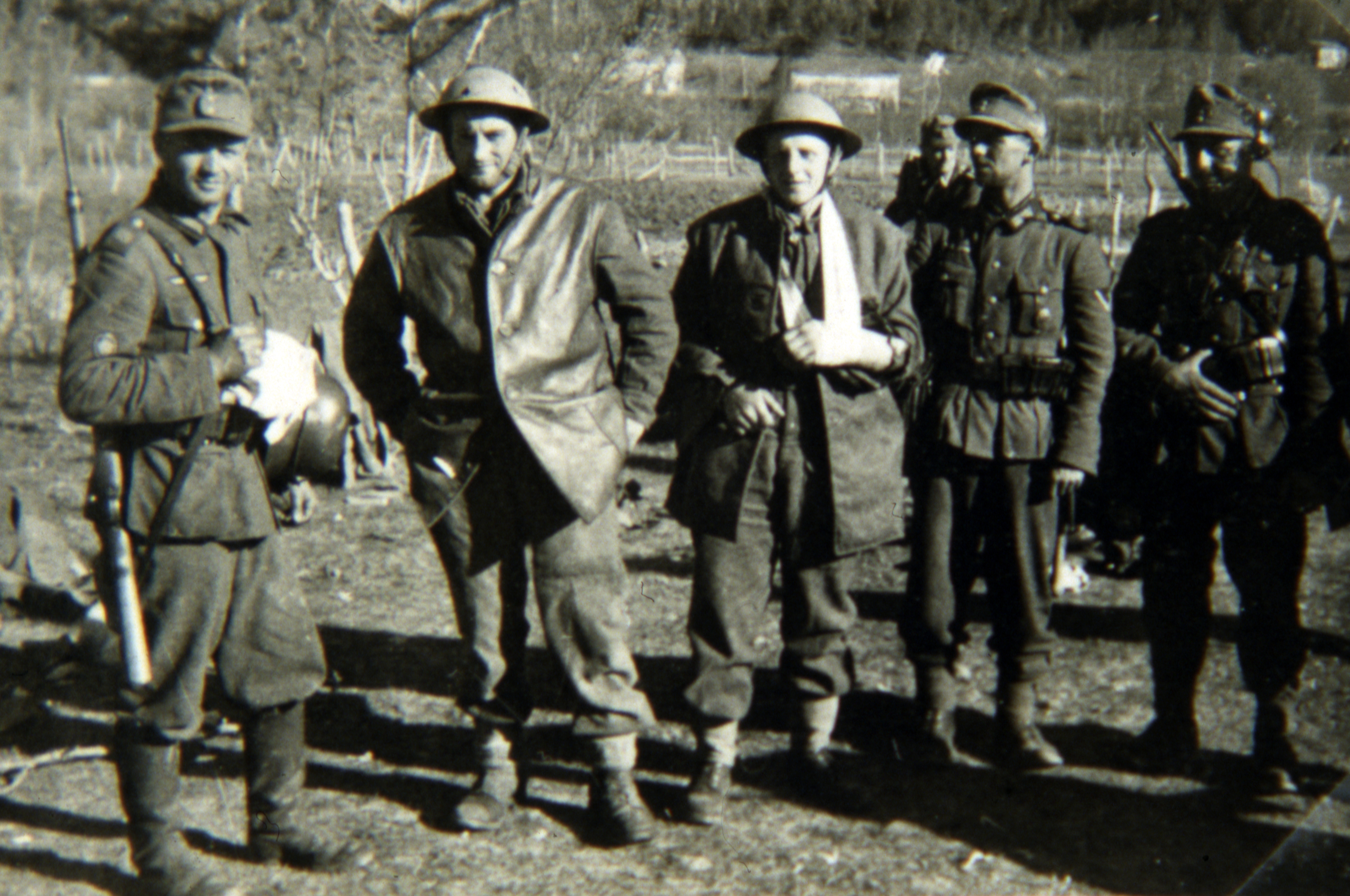 To engelskmenn tatt til fange ved Rognan Tittel / Title: To engelskmenn tatt til fange ved Rognan Motiv / Motif: Dato / Date: 27. mai 1940 Fotograf / Photographer: Ukjent/Unknown Utgiver / Publisher: Sted / Place: Rognan, Saltdal Eier / Owner Institution: Arkiv i Nordland Lenke / Link: Arkiv i Nordland Arkivreferanse /Archive reference: AIN.NA143.0378 Fra Dag Skogheims Privatarkiv Tekst til bildet: 27. mai 1940: Für zwei gefangene englander war der kampf zu ende ( bei Rognan). 27. mai 1940: For to fangede engelskmenn var kampen over ( ved Rognan).